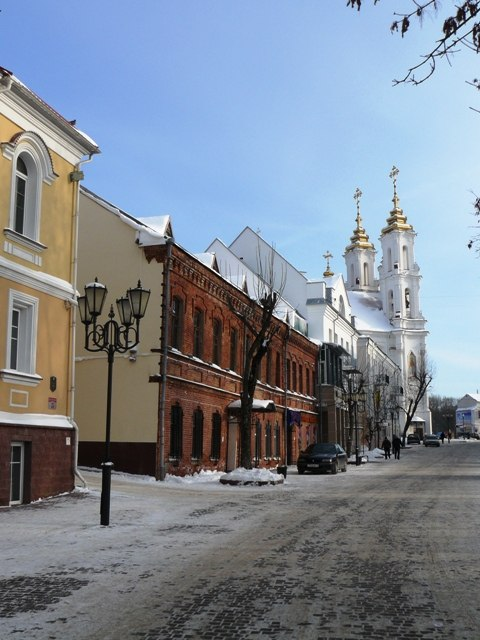 Витебск. Фото путешествия по Беларуси.